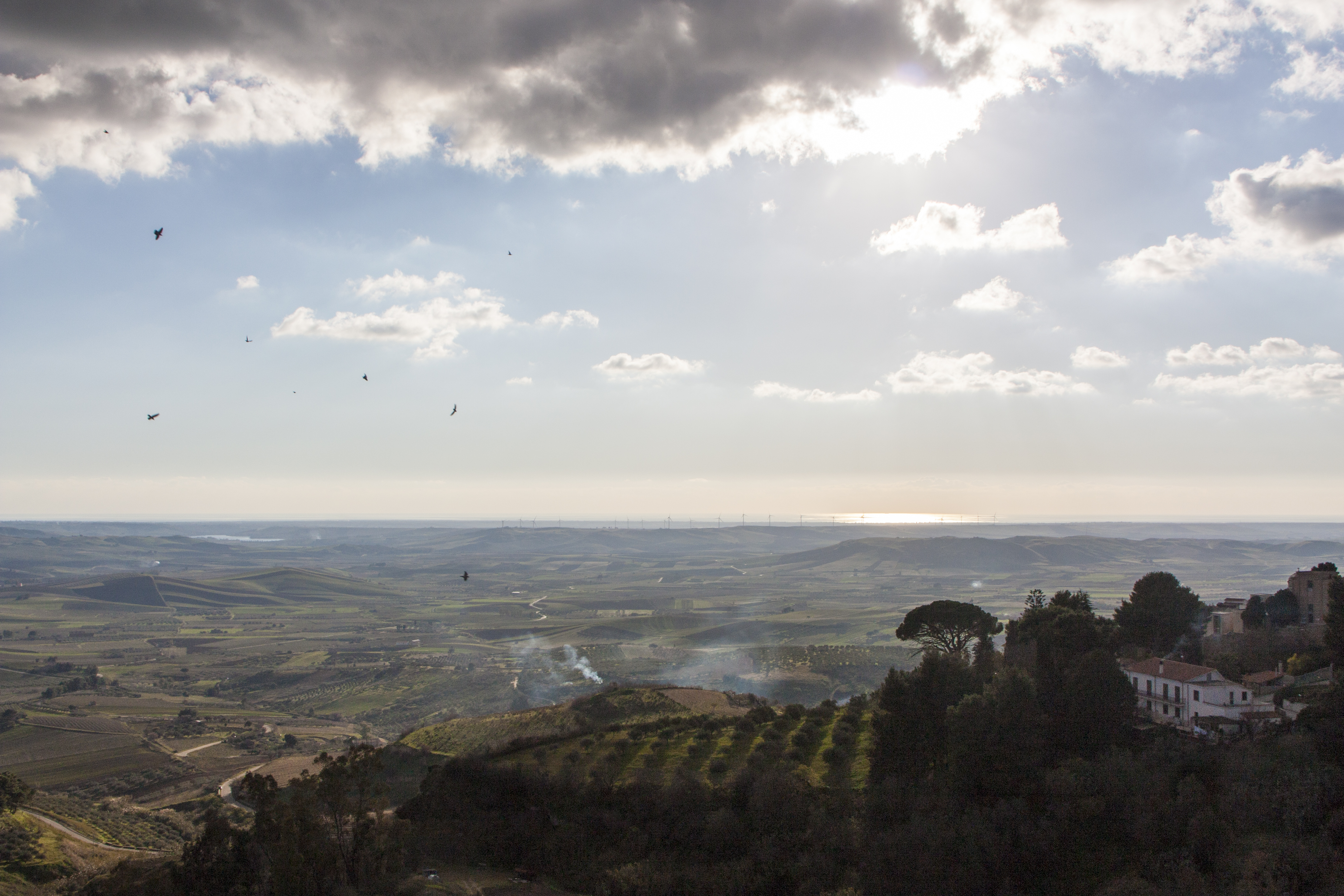 Il lago (a sinistra) visto da Salemi